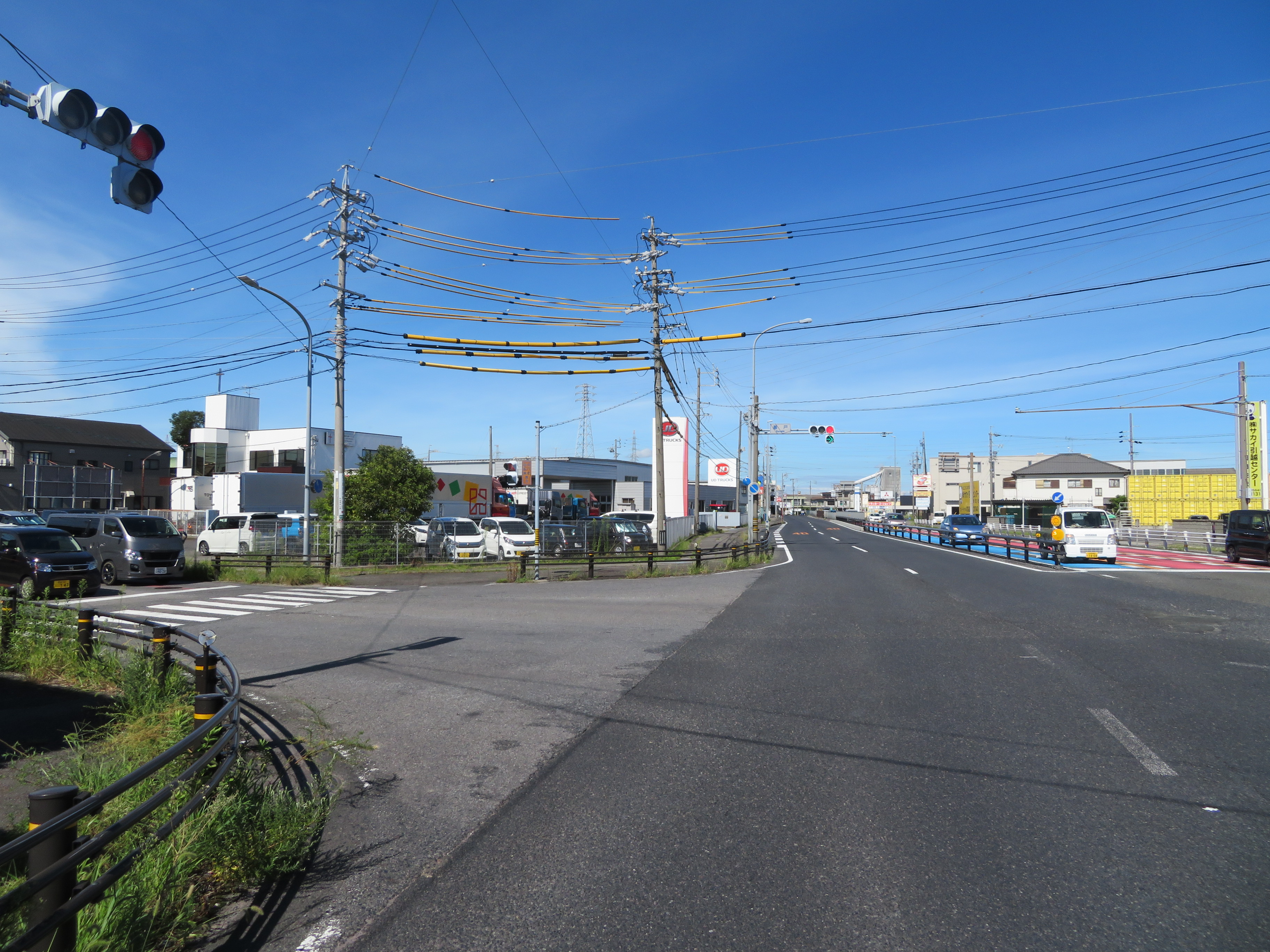 愛知県道26号岡崎環状線と国道1号の交差点。岡崎市宇頭町。